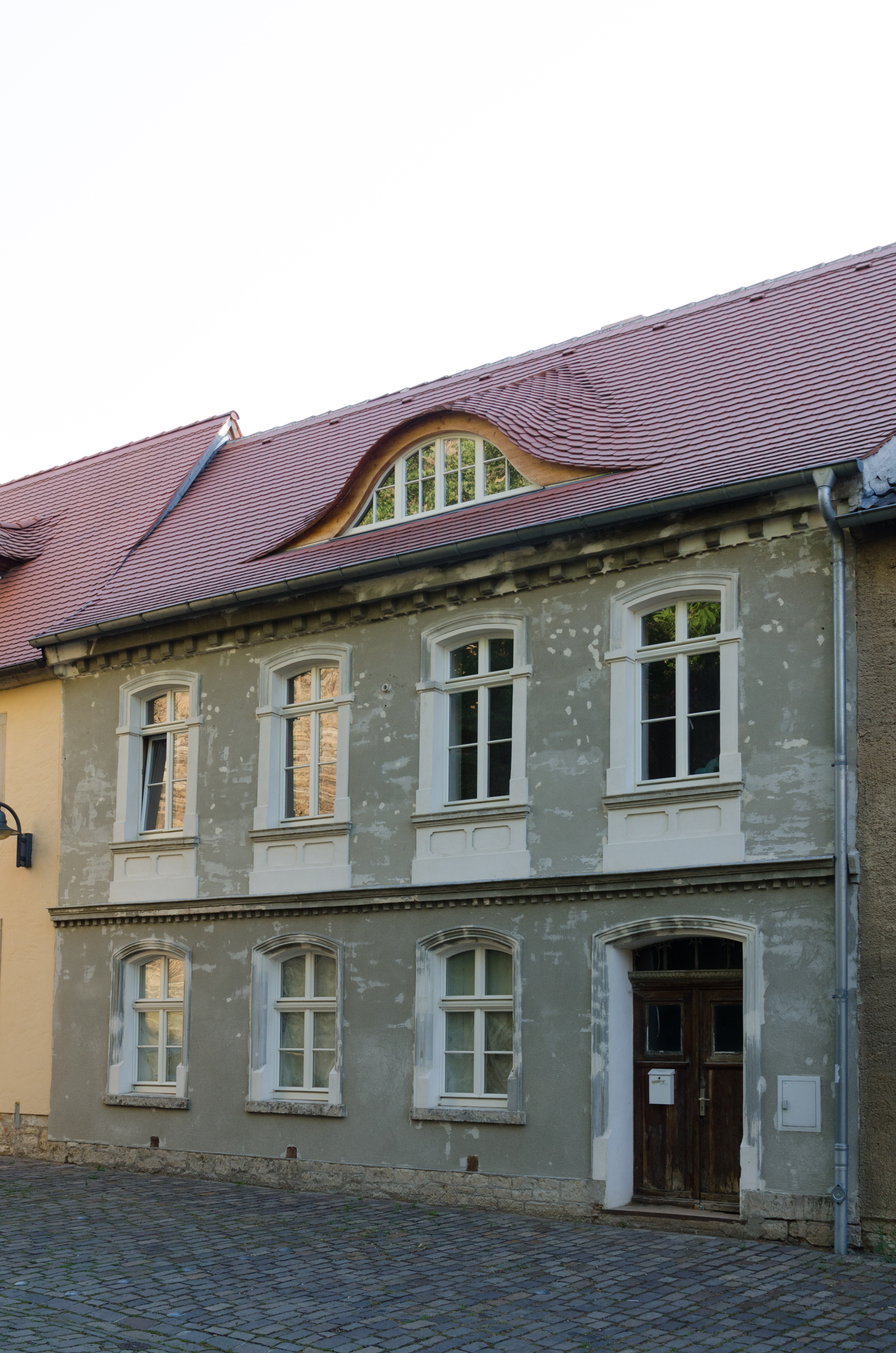 Querfurt, Kirchplan 6